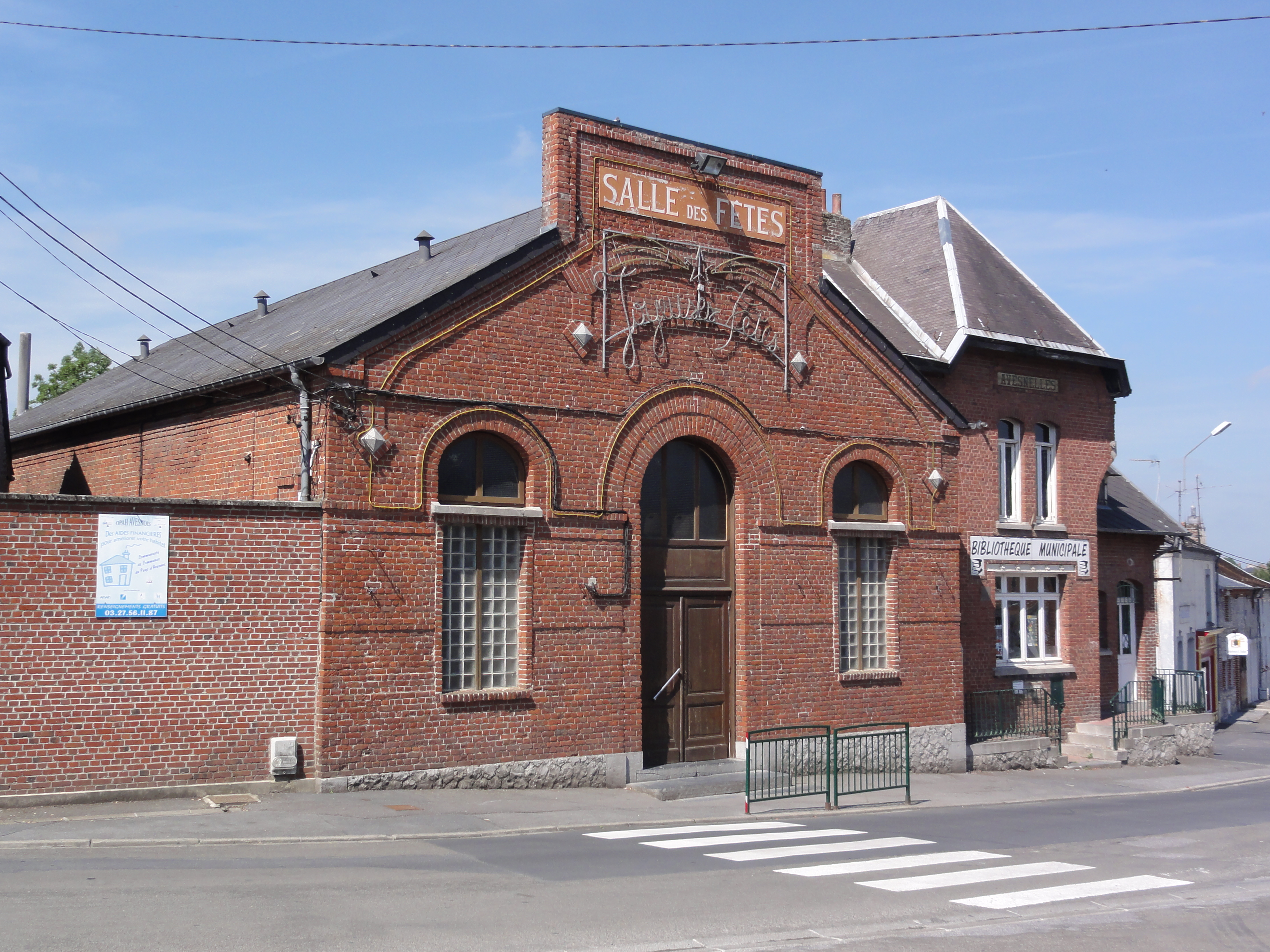 Avesnelles (Nord, Fr) salle des fêtes, bibliothèque